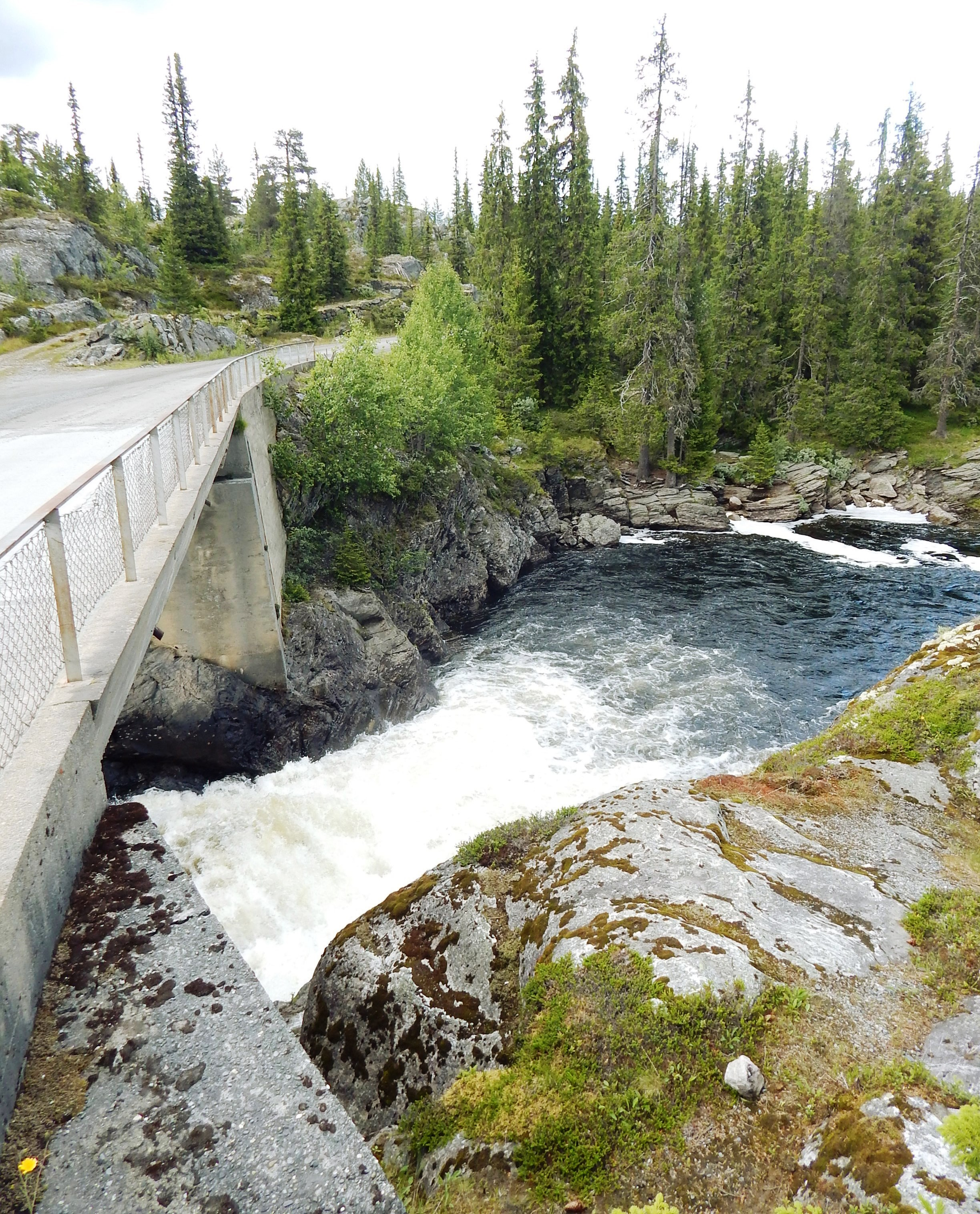 Holsfossen i Dokkelva